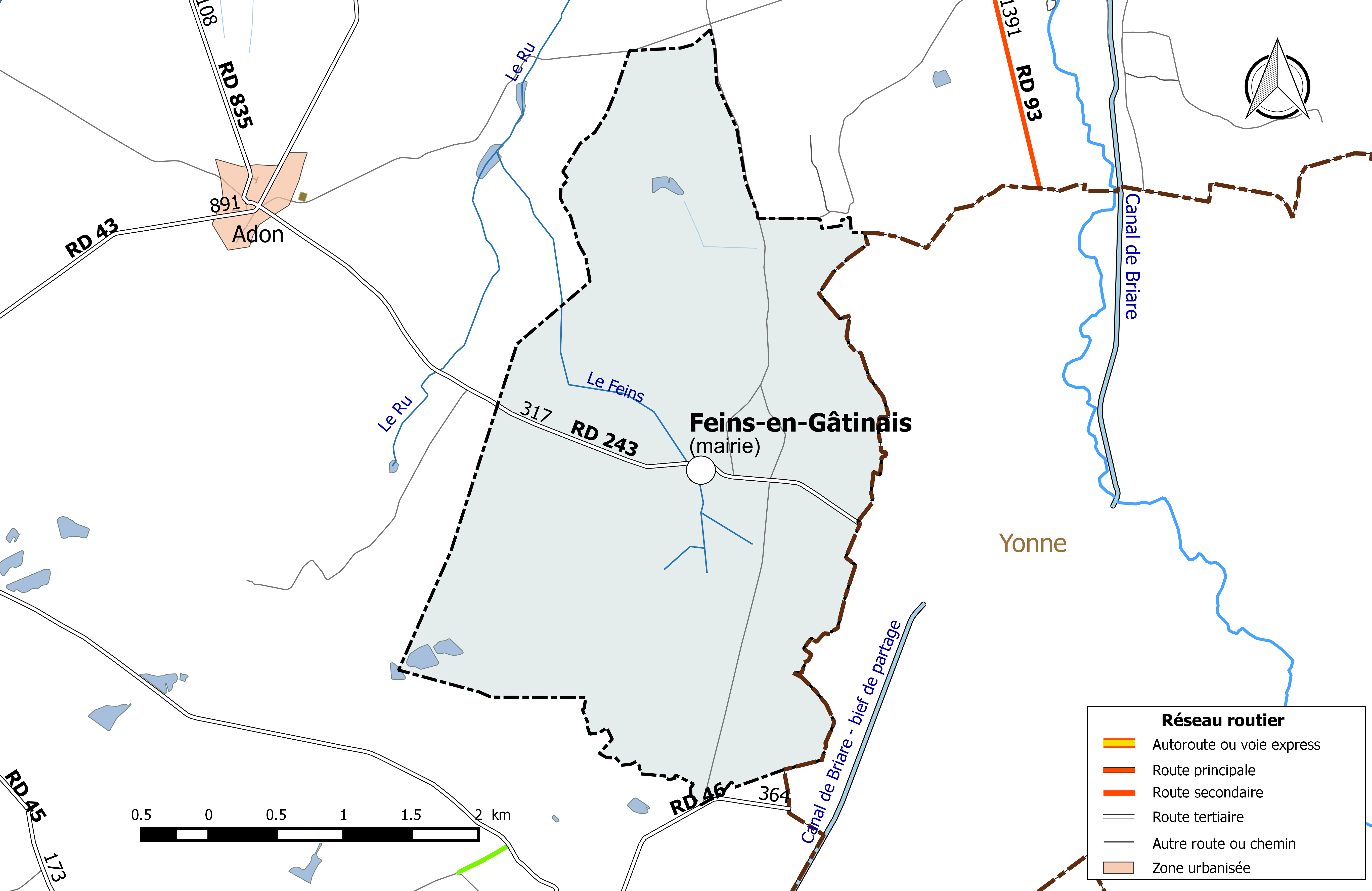 Carte du réseau routier de la commune de Feins-en-Gâtinais.